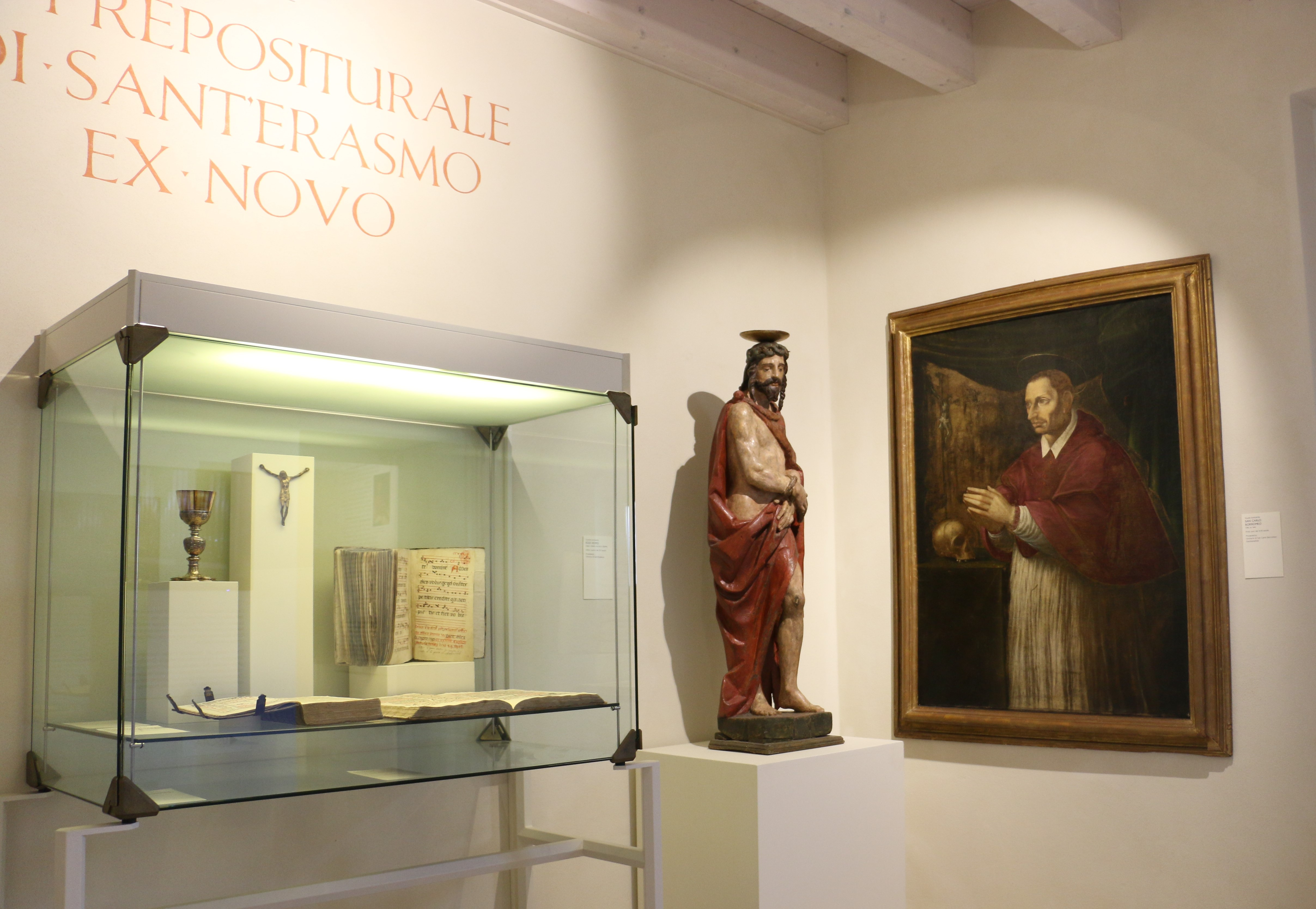 MAST Castel Goffredo-La chiesa prepositurale di Sant'Erasmo